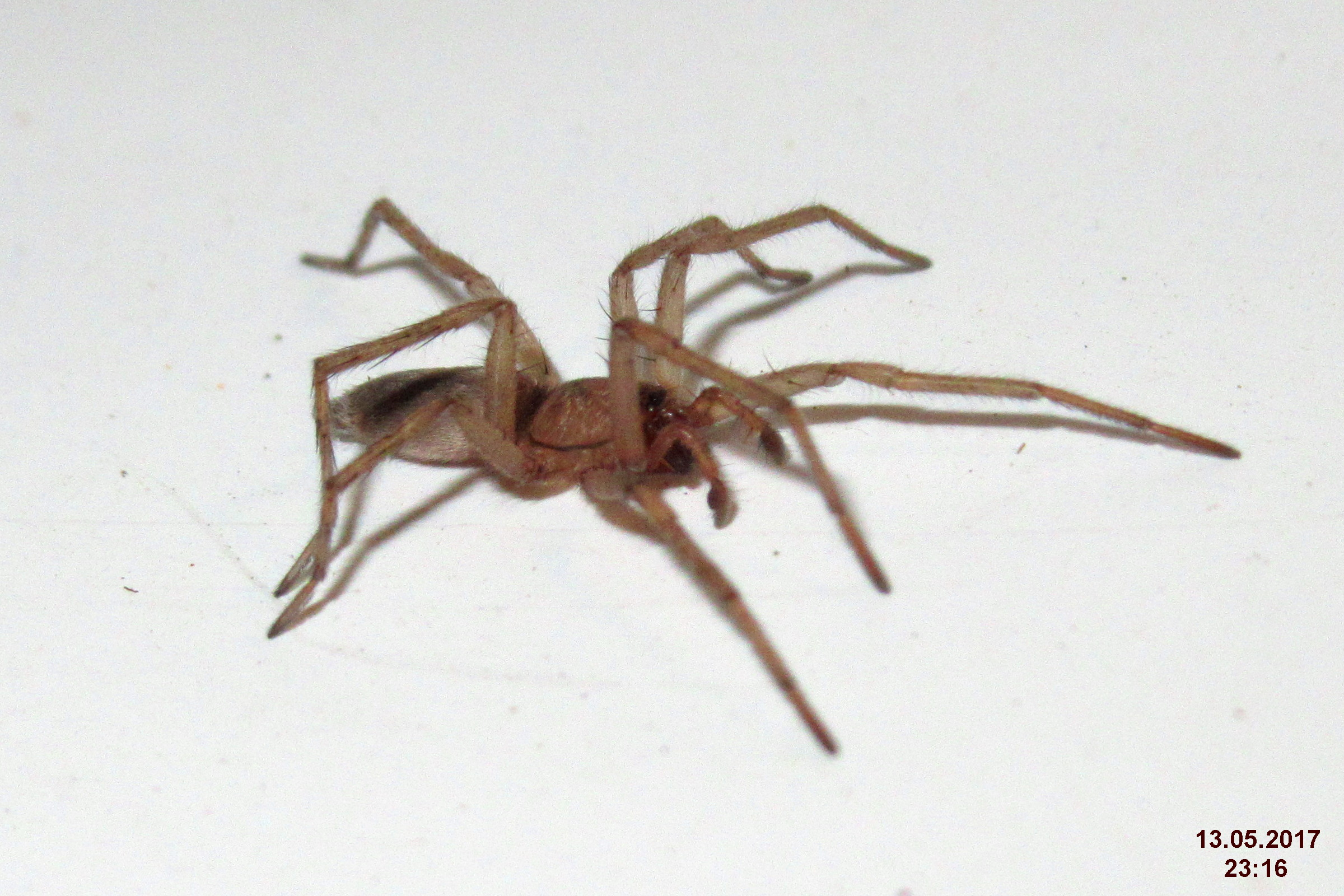 Scotophaeus blackwalli - skálovka Blackwallova.